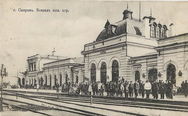 Вокзал в Сызрани. Дореволюционная открытка